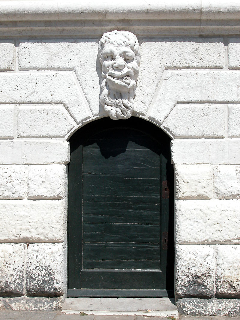 chiave di volta dell'accesso alla torre campanaria